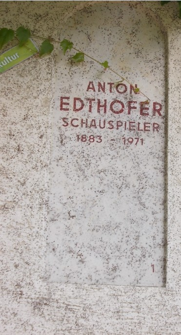 Grab Anton Edthofer-Friedhof Südwest